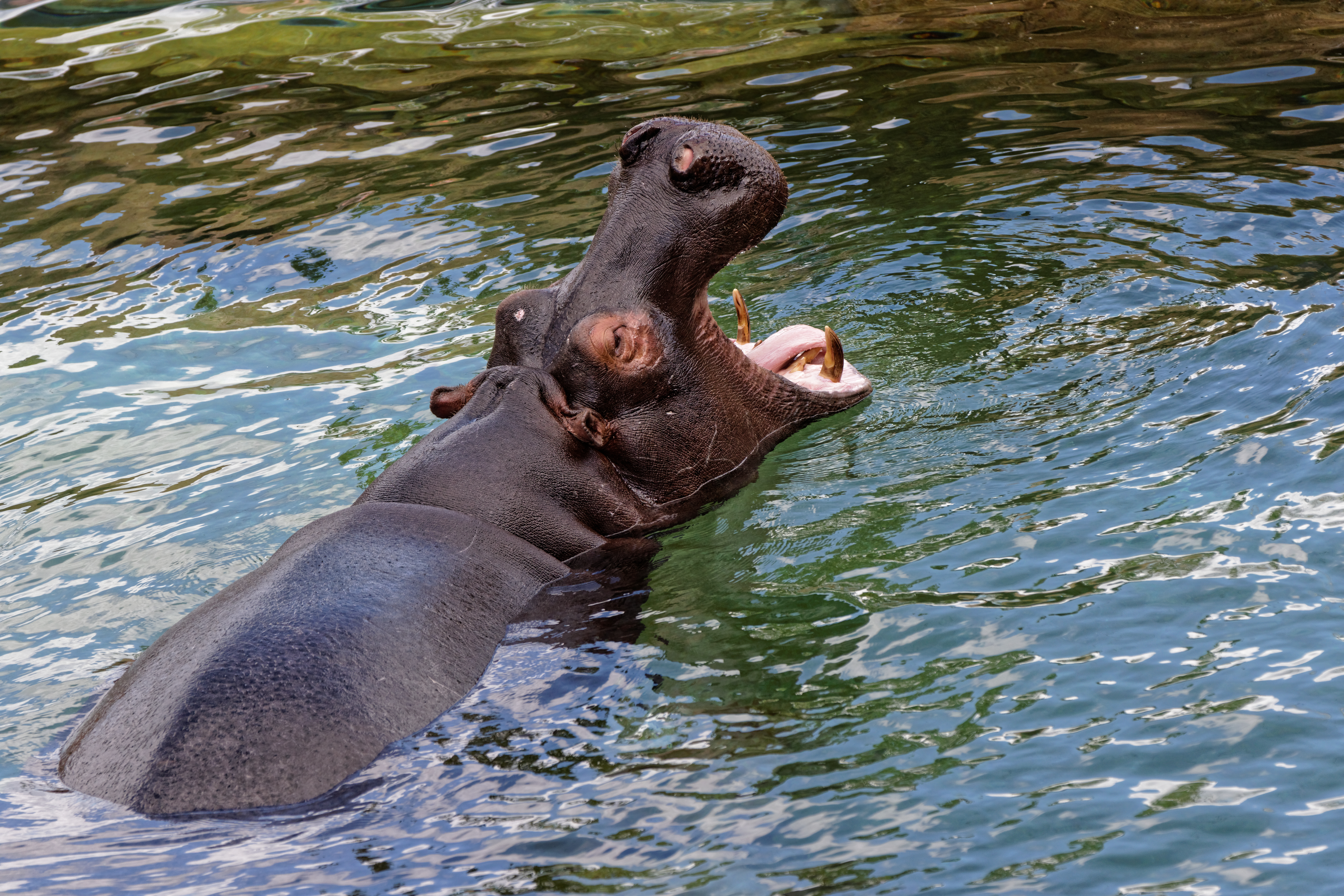 Un hippopotame au ZooParc de Beauval.